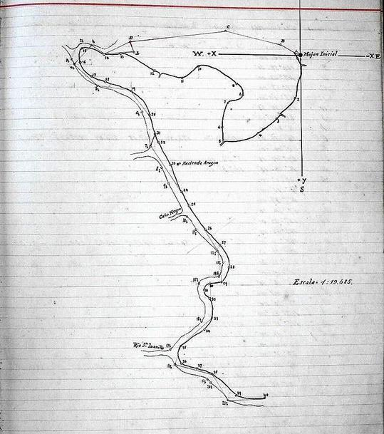 Croquis elaborado por E.P.Alexander durante la elaboración del primer laudo para definir los límites entre Costa Rica y Nicaragua. 1898.